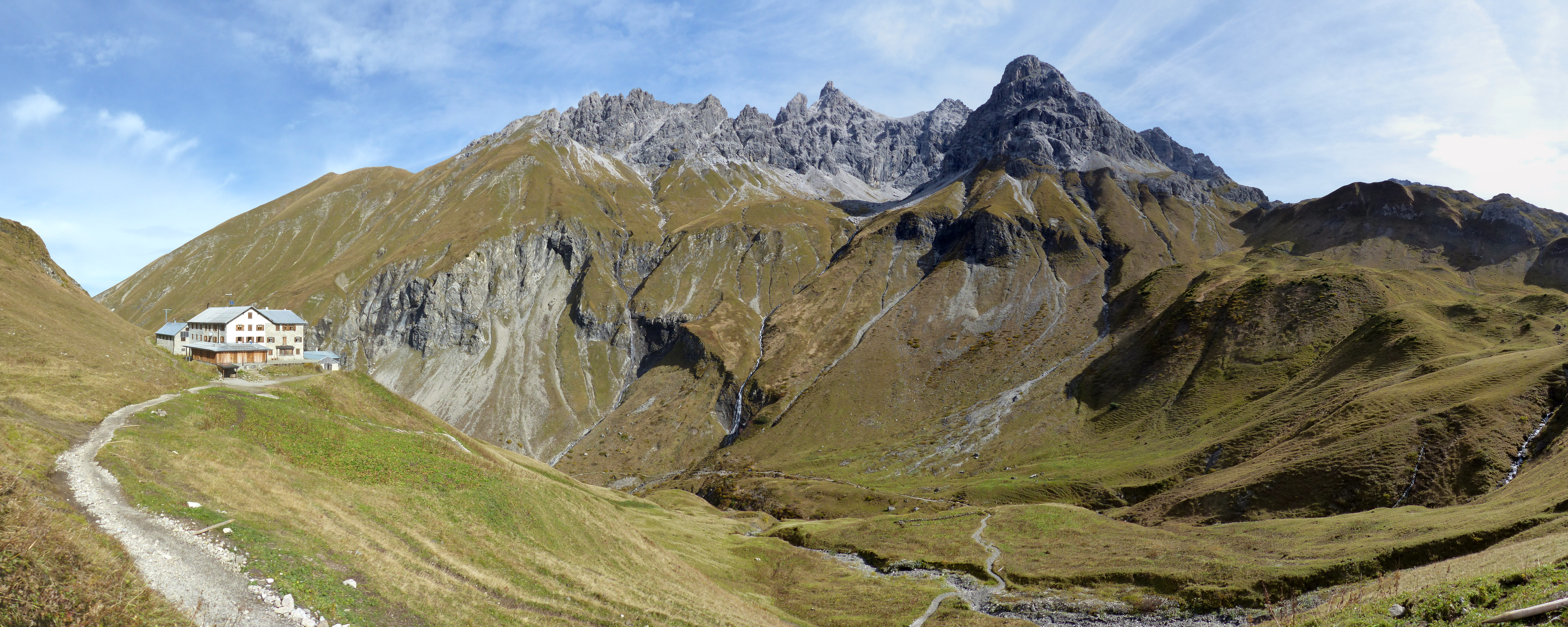 Kemptner Hütte mit Krottenspitze, Öffnerspitze und Muttlerkopf (zusammengesetzt aus 6 Teilbildern)